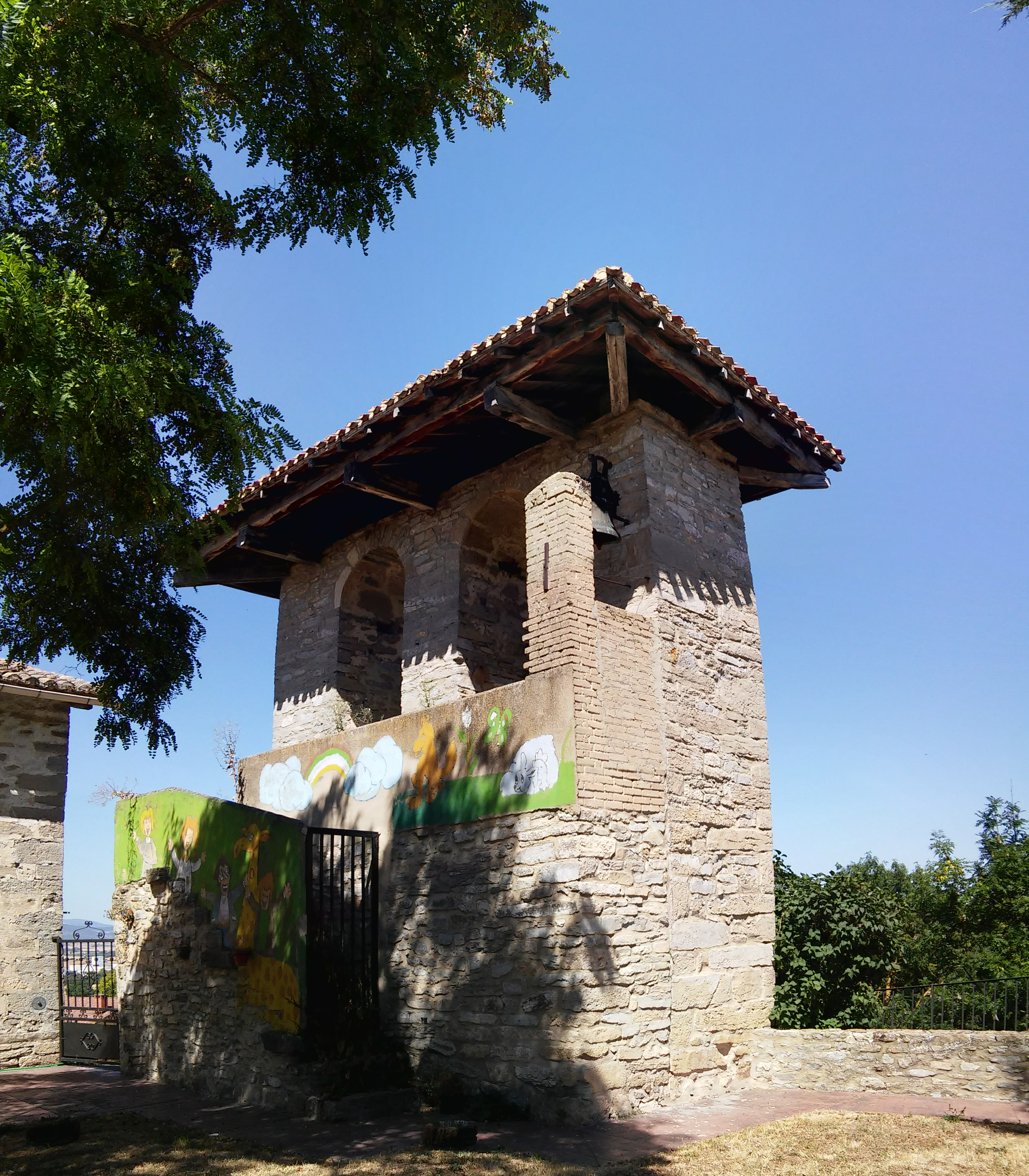 Subilla Gasteiz herriko kanpandorrea